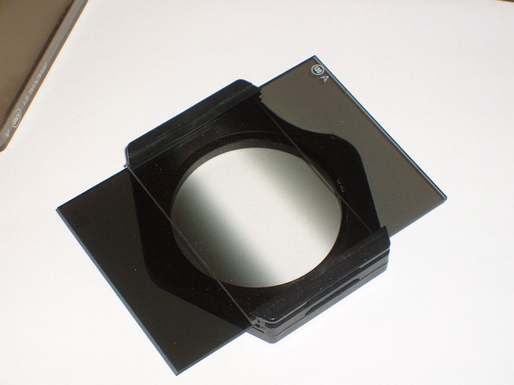 Cokin-Filtersystem, Halter mit zwei Verlaufsfiltern